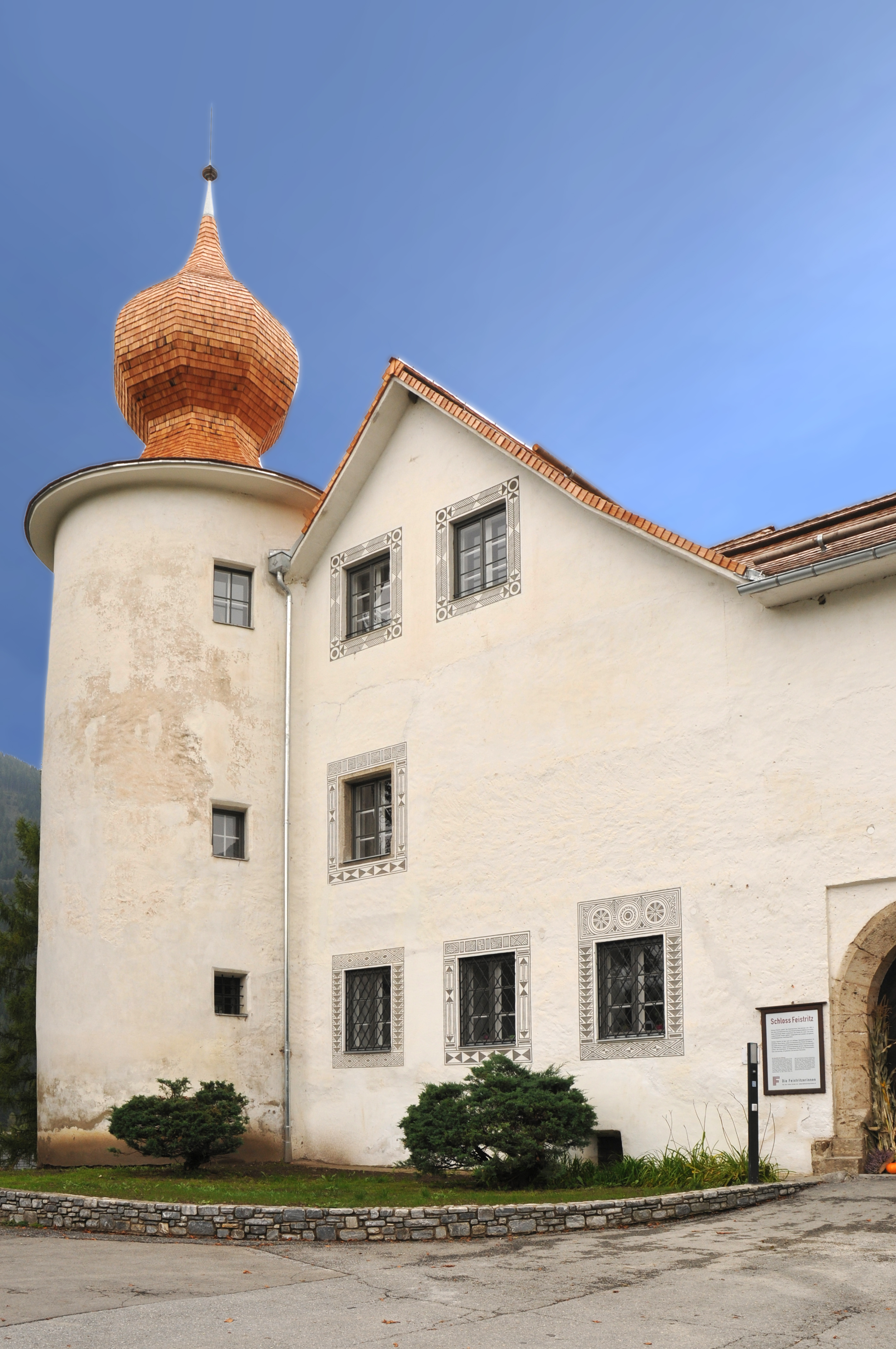 Schloss Feistritz Dieses Bild wurde anlässlich des österreichischen Tags des Denkmals 2012 in der Steiermark eingereicht.